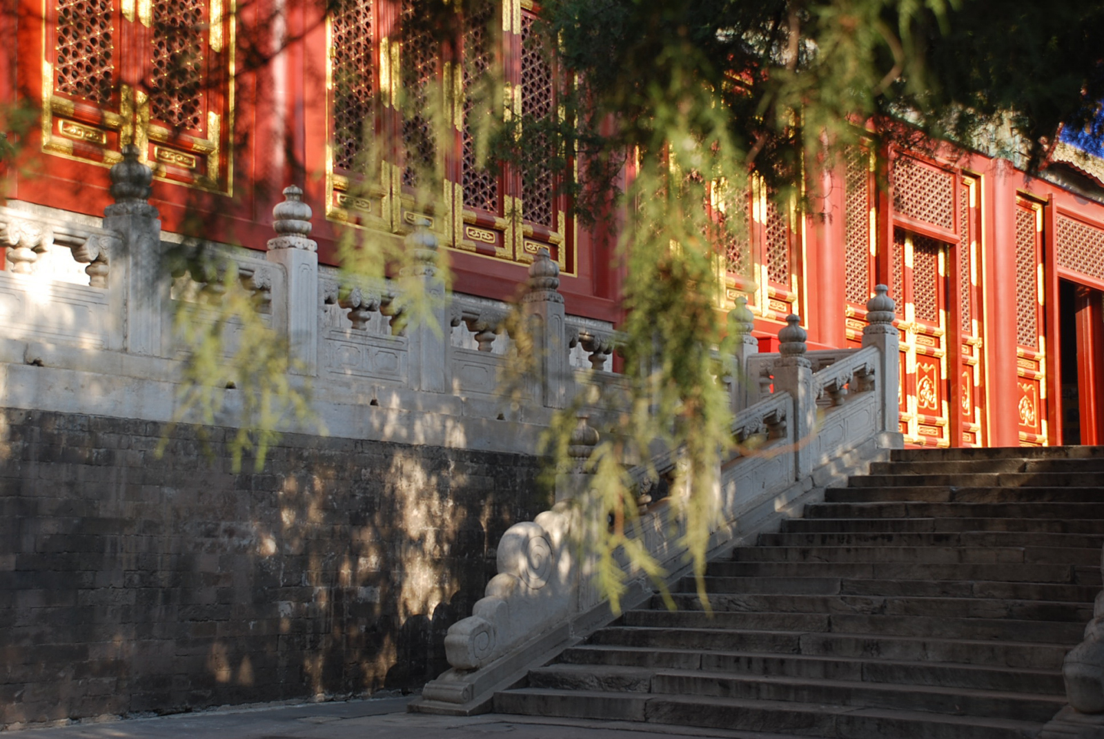 北京孔庙大成殿的汉白玉护栏